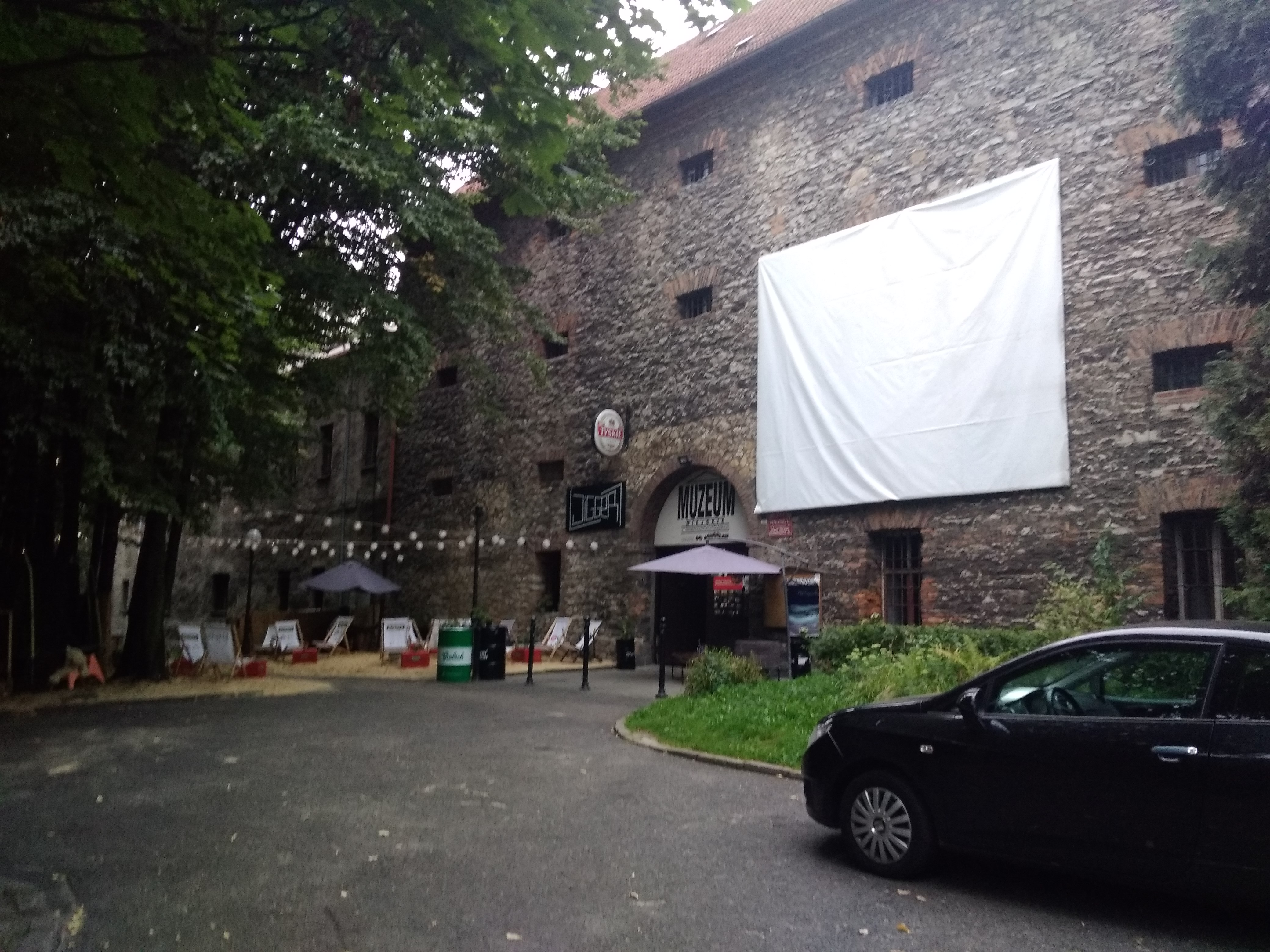 Muzeum Miejskie w Siemianowicach Śląskich - zdj. frontu